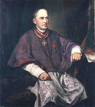 brněnský biskup Karel Nöttig